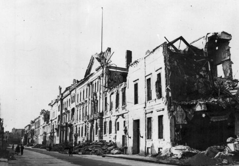 ADN-ZB/Archiv Berlin Die im II. Weltkrieg zerstörte Wilhelmstraße (umbenannt in Otto-Grotewohl-Straße) vom Wilhelmplatz (umbenannt in Thälmannplatz) nach Norden gesehen. Vorn Seitenflügel des Reichsministeriums für Aufklärung und Propaganda. Aufn. Frühjahr 1946